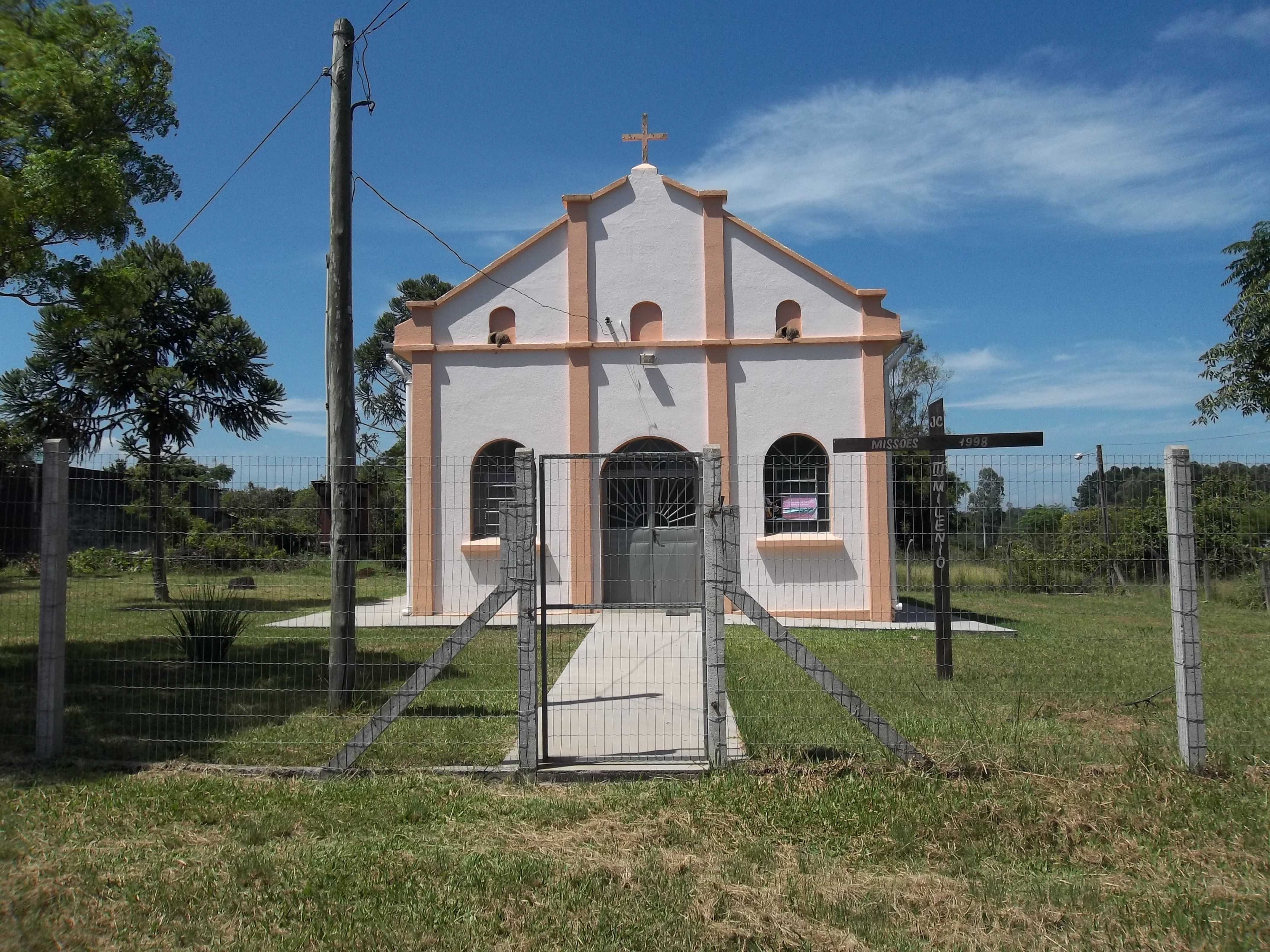 Igreja Santa Cecília. Diácono João Luiz Pozzobon, Sede, Santa Maria, Rio Grande do Sul, Brasil